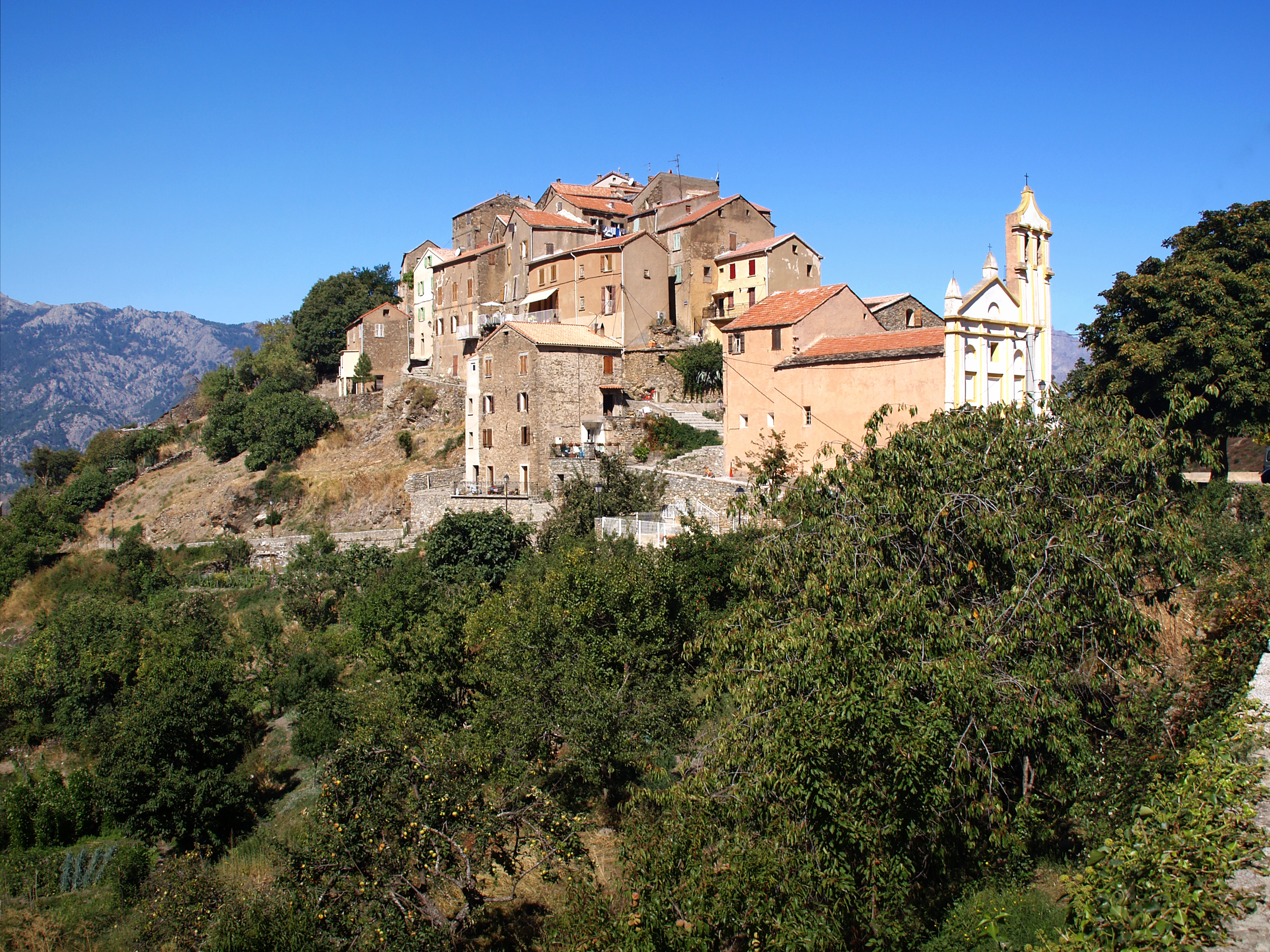 Tralonca, Bozio (Corse) - Vue du village